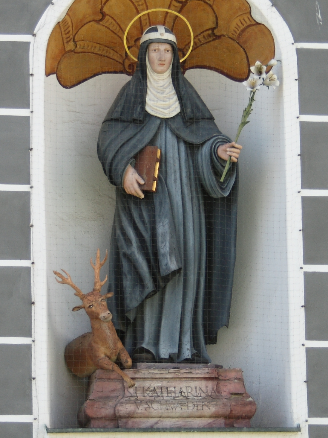 Santa Catarina da Suécia